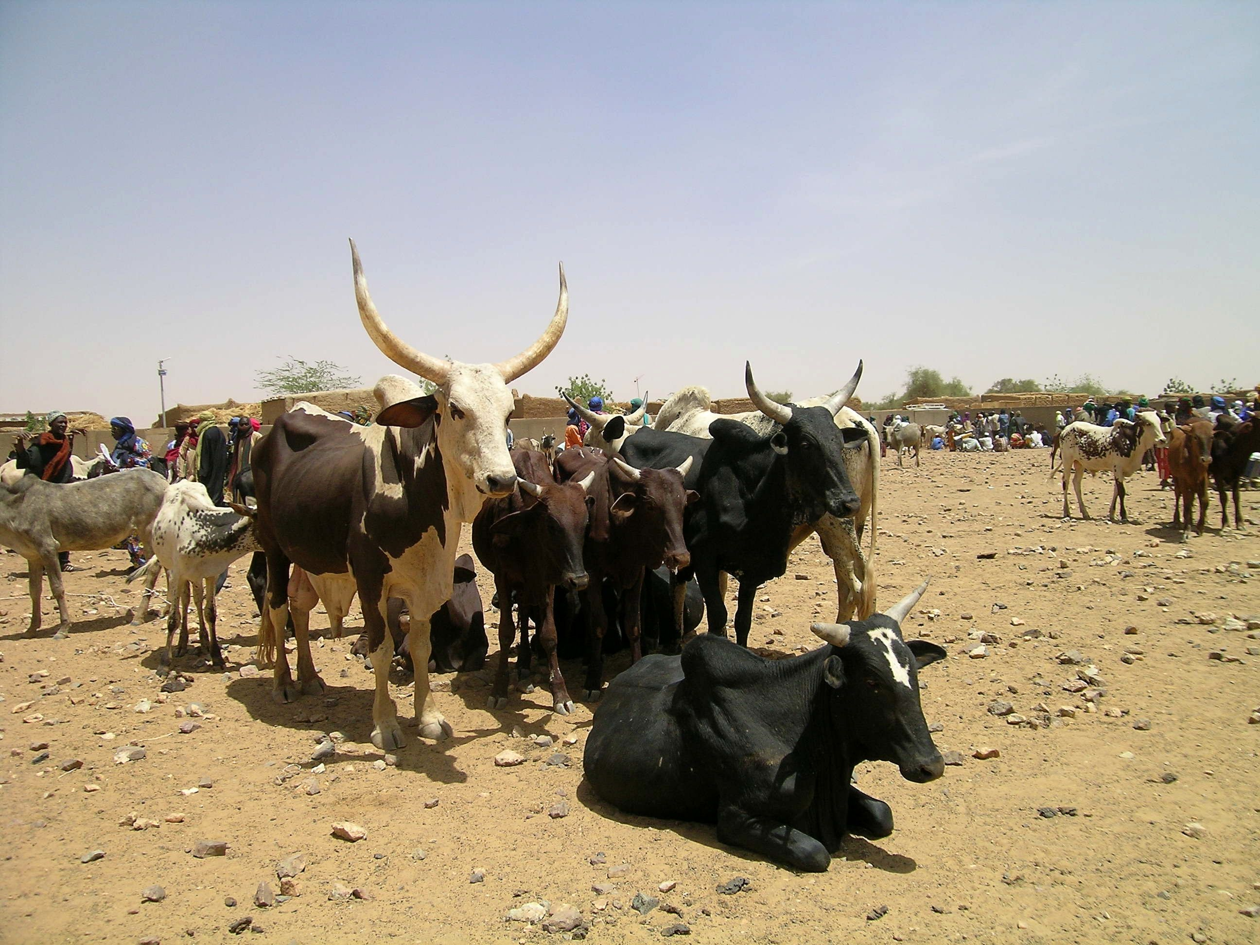 vaches africaines au marché de Gorom-Gorom, Burkina Faso